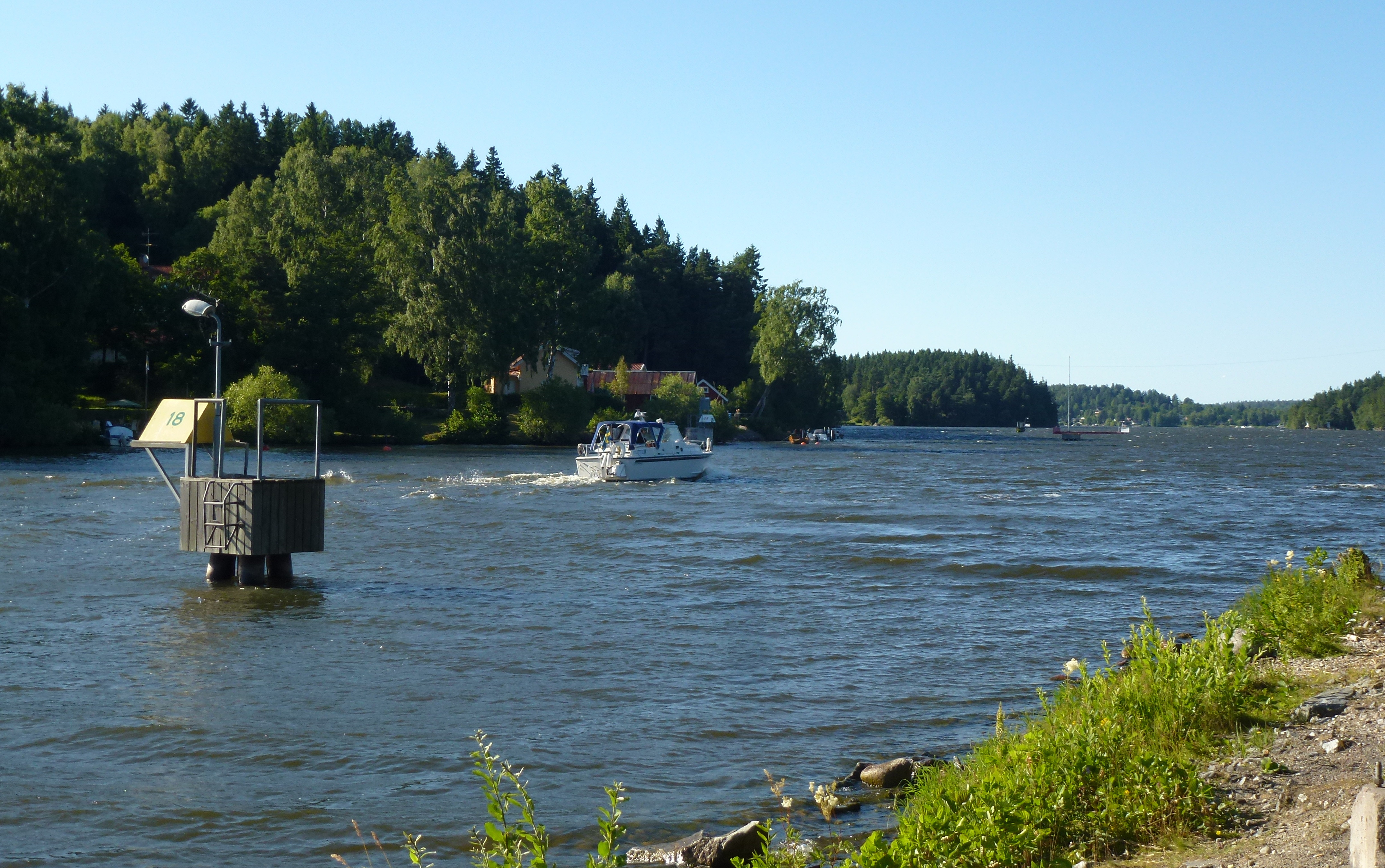 Linasundet vid Tege hus